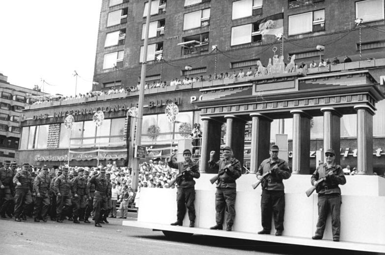 Berlin, 750-Jahr-Feier, Festumzug, Mauerbau ADN-ZB Mittelstädt 4.7.87 Berlin: Jubiläum-Festumzug. Angehörige der Kampfgruppen der Arbeiterklasse symbolisierten beim großen Festumzug durch das Stadtzentrum anläßlich des 750jährigen Stadtjubiläums die Errichtung des antifaschistischen Schutzwalls am 13.8.1961. Die vier Kämpfer vor dem stilisierten Brandenburger Tor hatten an jenem Tag unmittelbar an diesem Wahrzeichen Berlins an der Sicherung der Staatsgrenze teilgenommen. [Berlin.- 750-Jahr-Feier, Festumzug, Mitglieder der Kampfgruppen (Paul Stiawa, Joachim Behrens, Roland Höfer und Werner Fromm) vor stilisiertem Brandenburger Tor [vgl. Bild 183-85458-0001, Bild 183-E0811-0042-001, Bild 183-Z0731-400